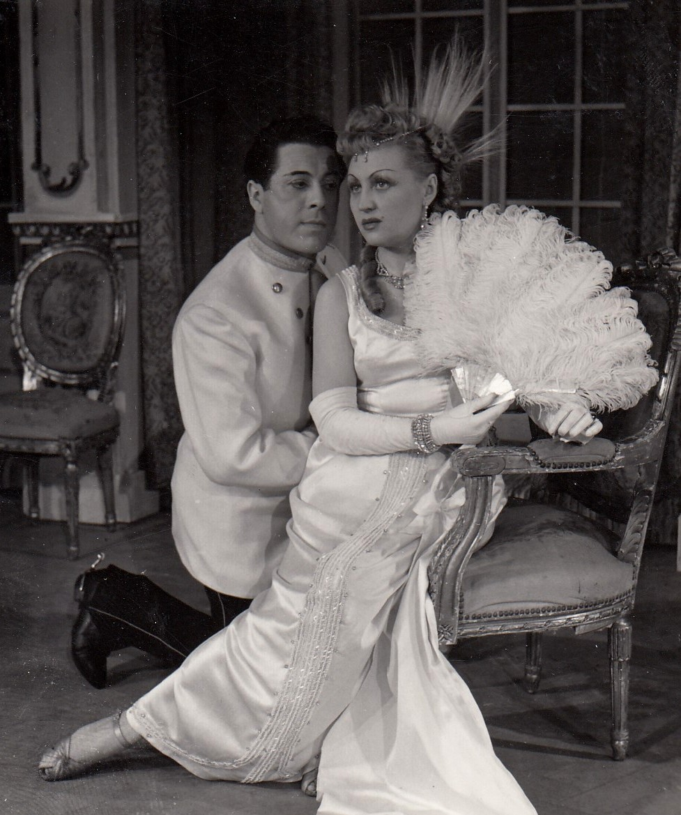 Mucsi Sándor (1926-2006) Edvin szerepében, Gyólay Viktória Szilvia szerepében a Csárdáskirálynőben, Kecskemét